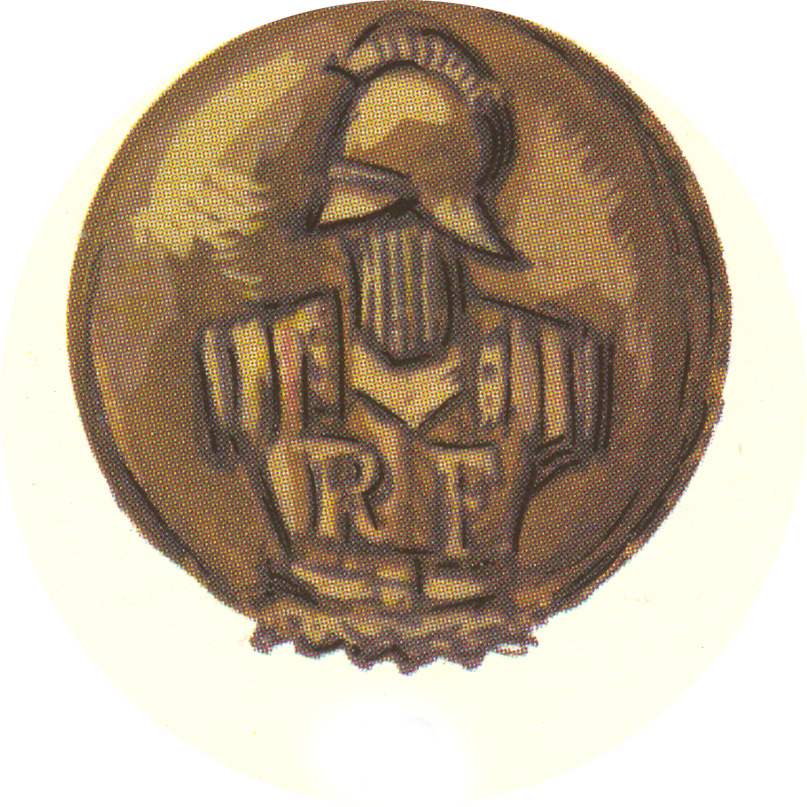 Insigne de casque de l'arme du Génie, 1939.